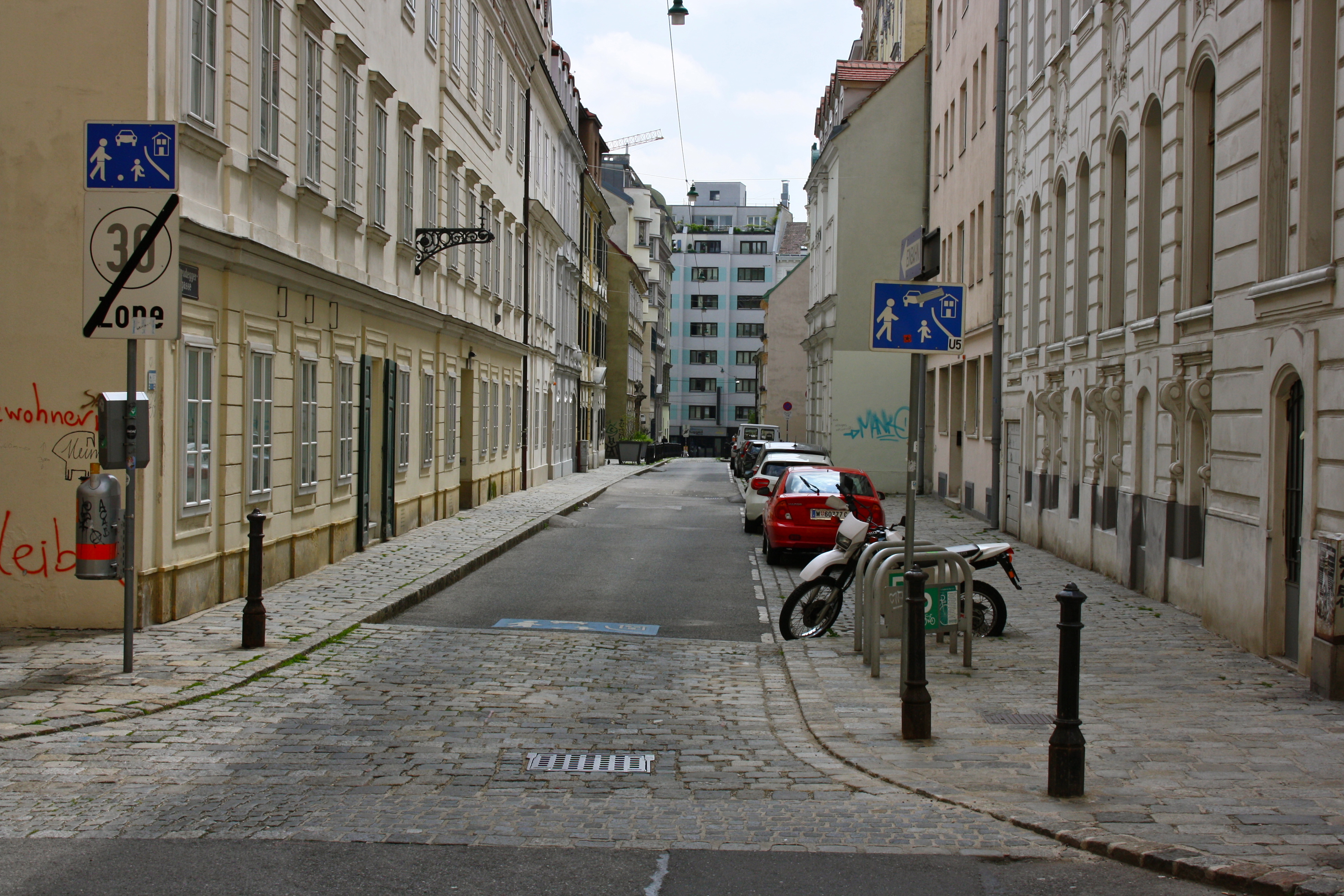 Neudeggergasse in Wien-Josefstadt.